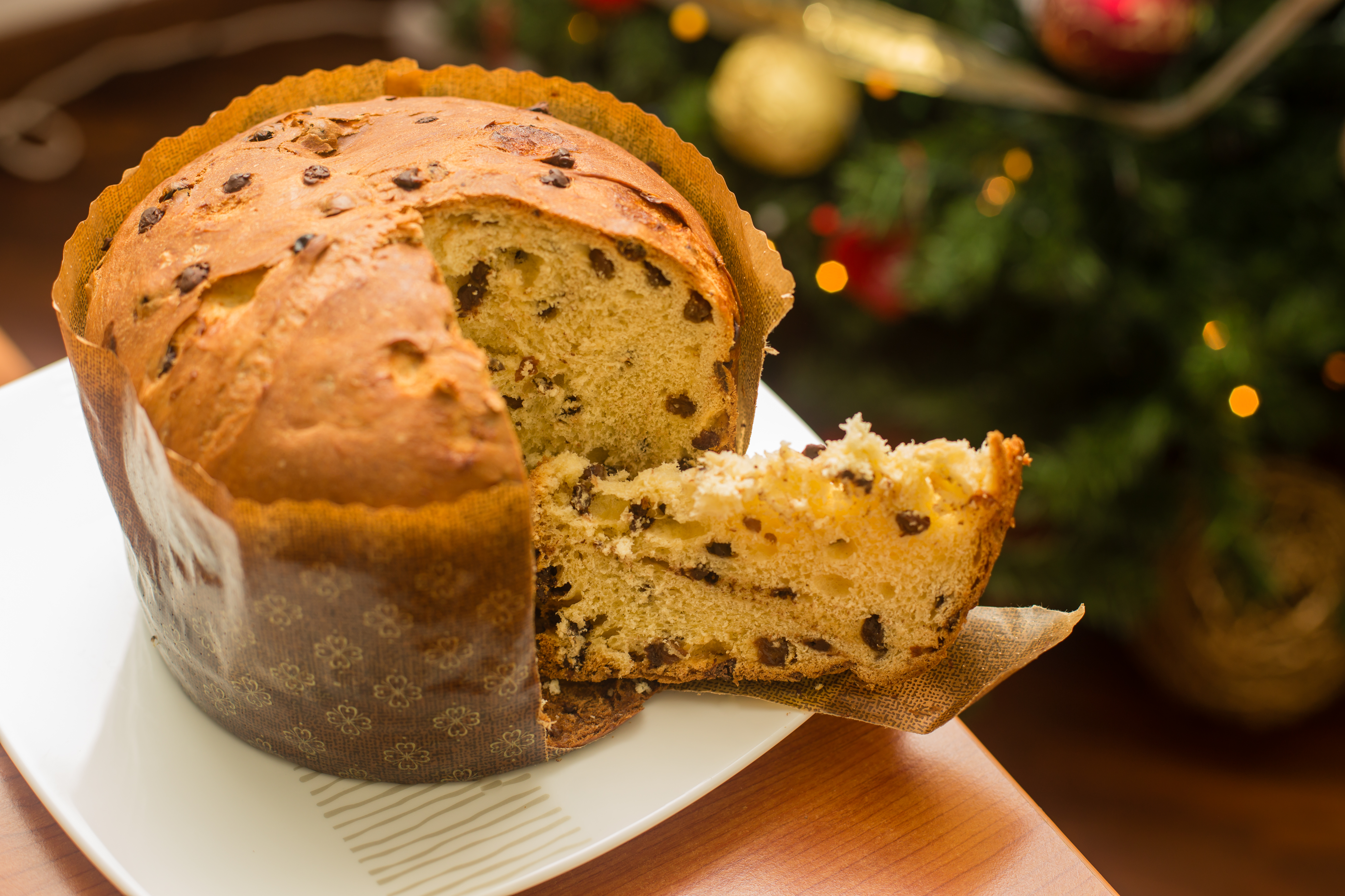 Panettone (pronounced /ˌpænᵻˈtoʊni/;[1][2][3]